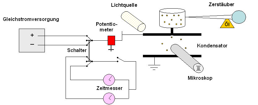 Öltröpfchenversuch von Robert Andrews Millikan